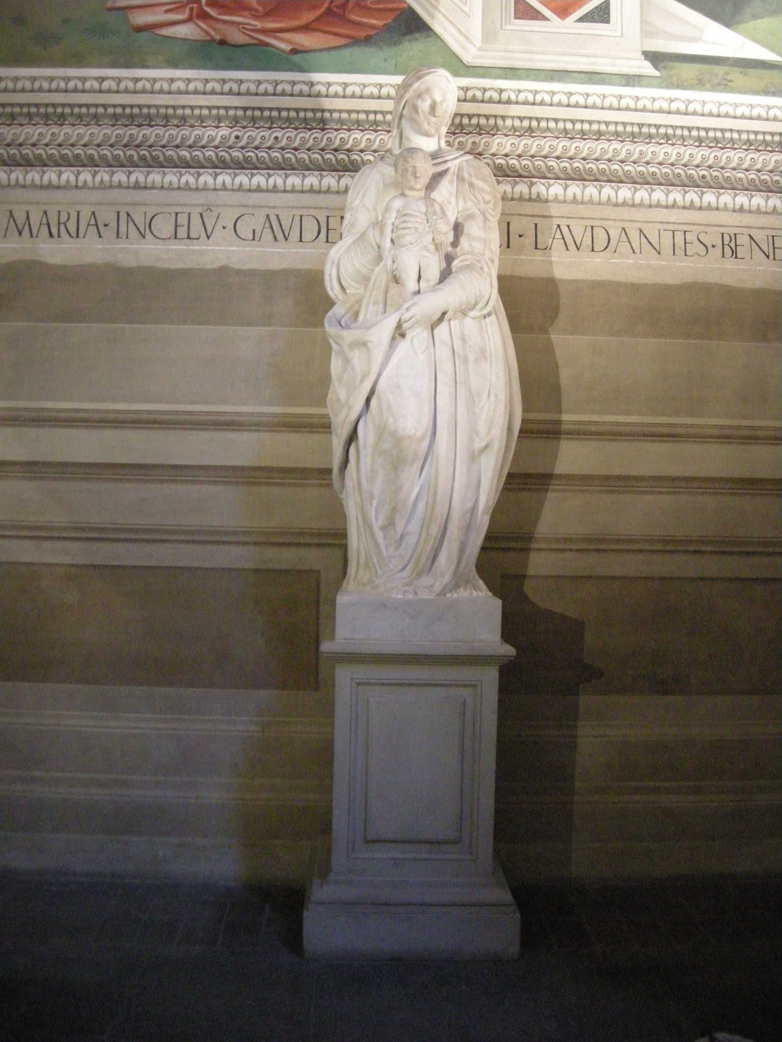 Cappella baroncelli, madonna col bambino di vincenzo danti